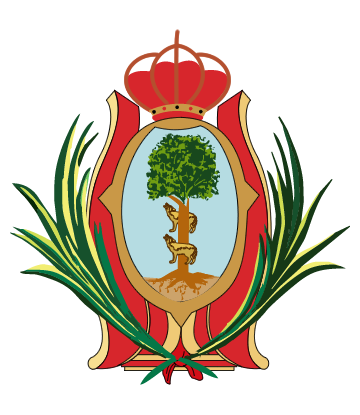 Escudo de armas del estado de Durango (México)